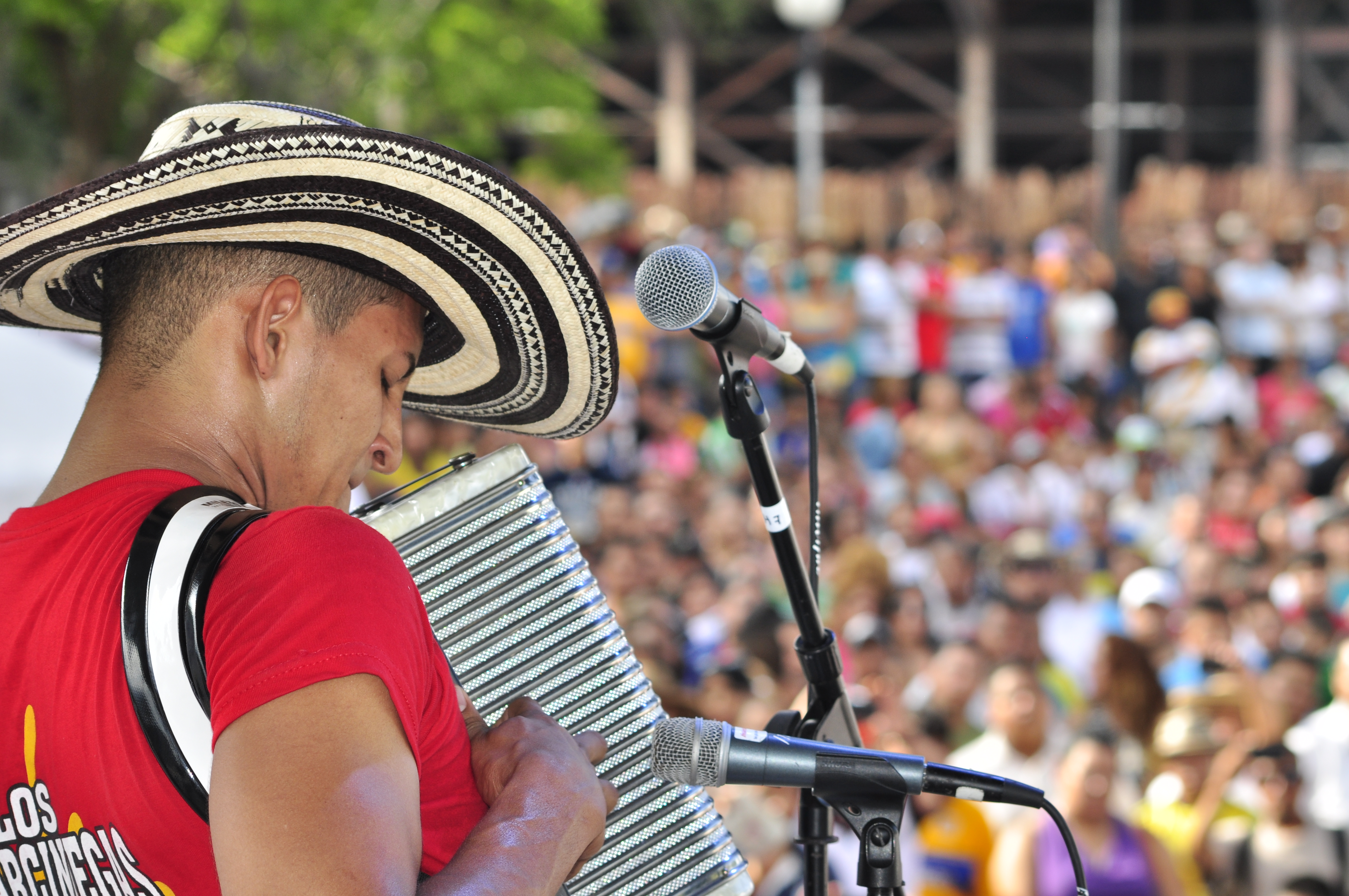 Acordeonero participando